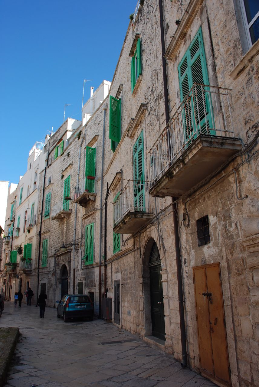 Autore:Dantes102 Fonte:Flickr Licenza:Creative commons